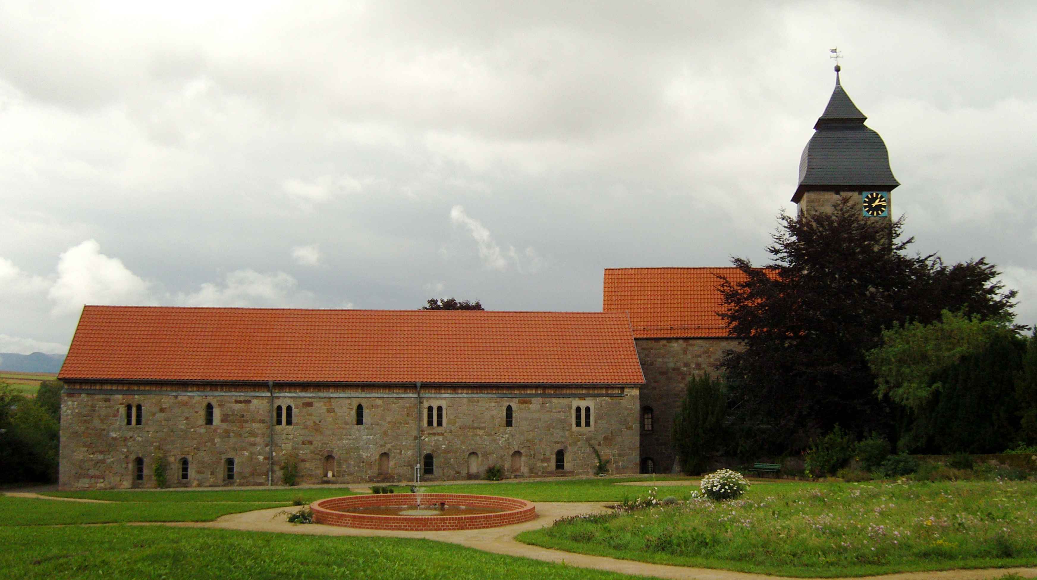 Blick auf das Kloster Germerode im Werra Meißner-Kreis bei Kassel.